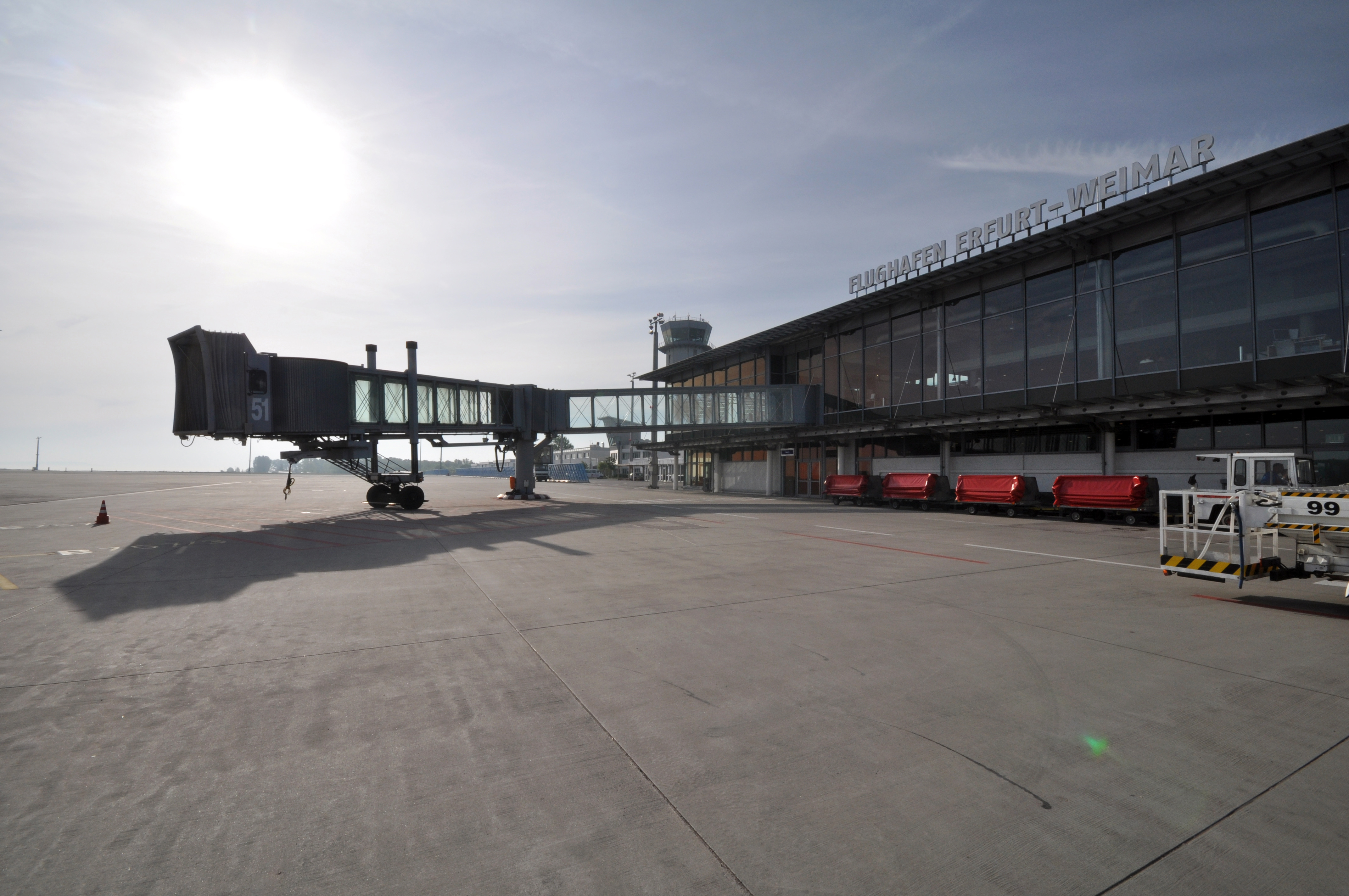 Flughafen Erfurt-Weimar